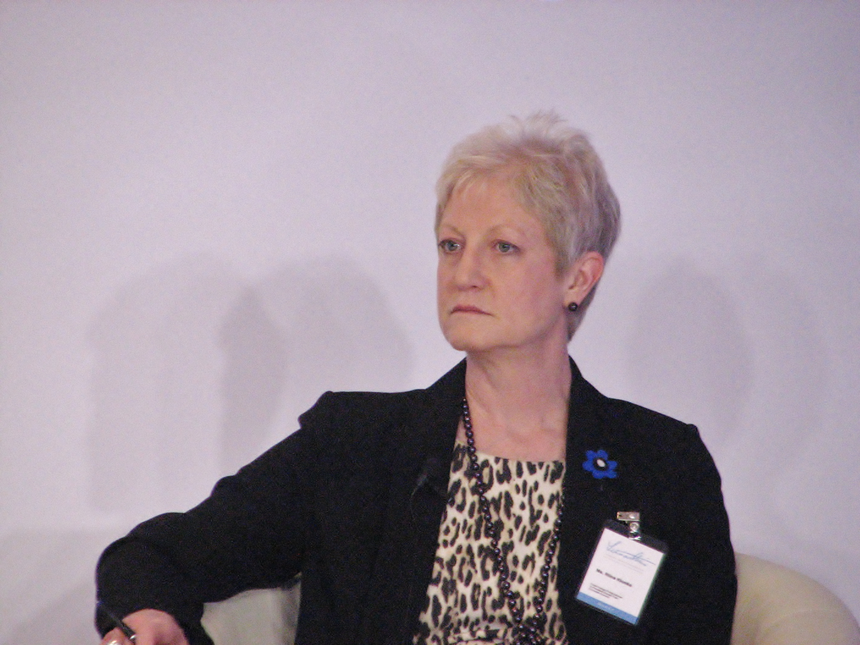 Riina Kionka esinemas kaheksandal Lennart Meri konverentsil